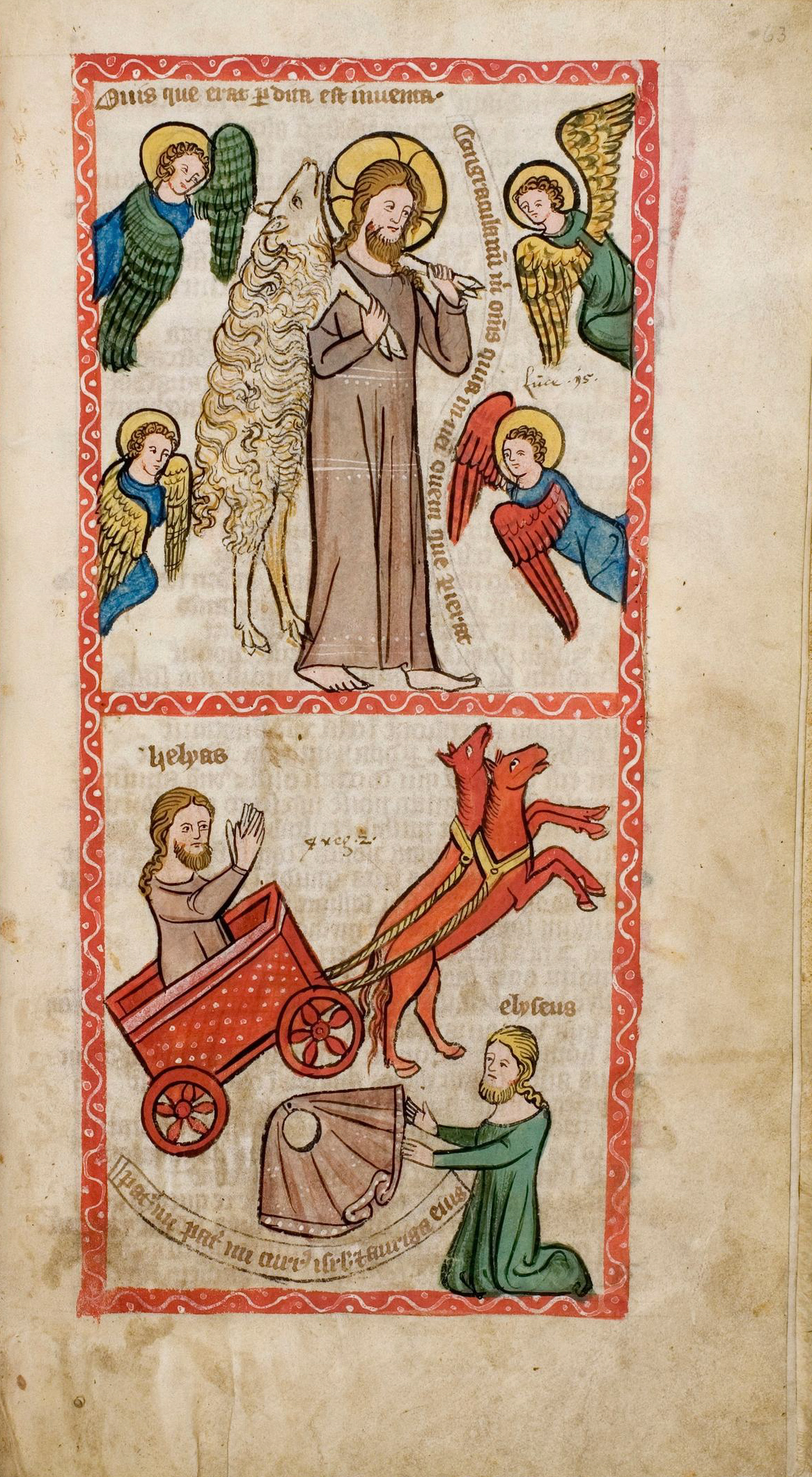 Speculum Humanae Salvationis, Westfalen oder Köln, um 1360. ULB Darmstadt, Hs 2505, fol. 63r / Freuet euch mit mir; denn ich habe mein Schaf gefunden, das verloren war. (Lukas 15, 6) / Himmelfahrt des Elias